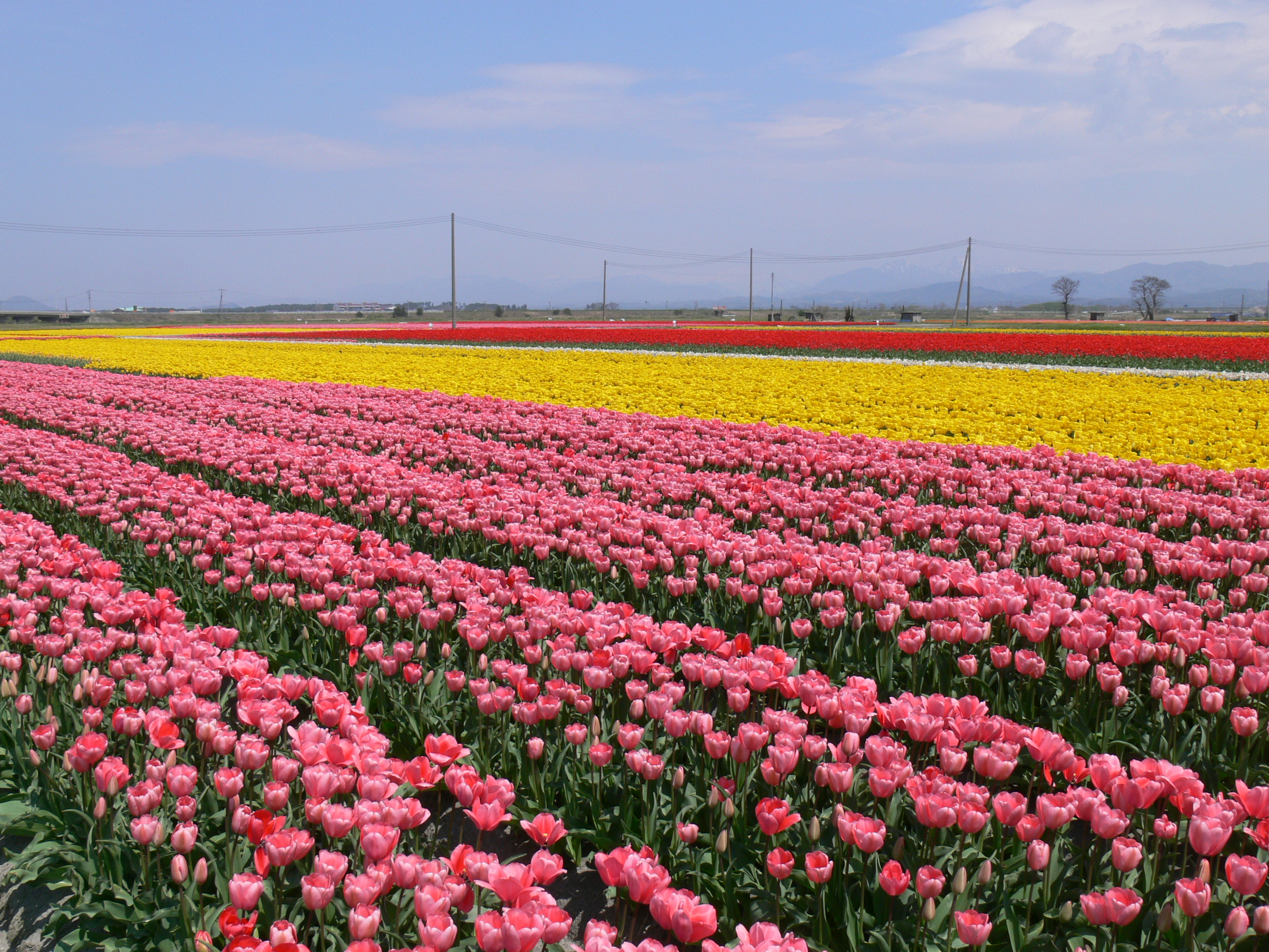 金屋 方面